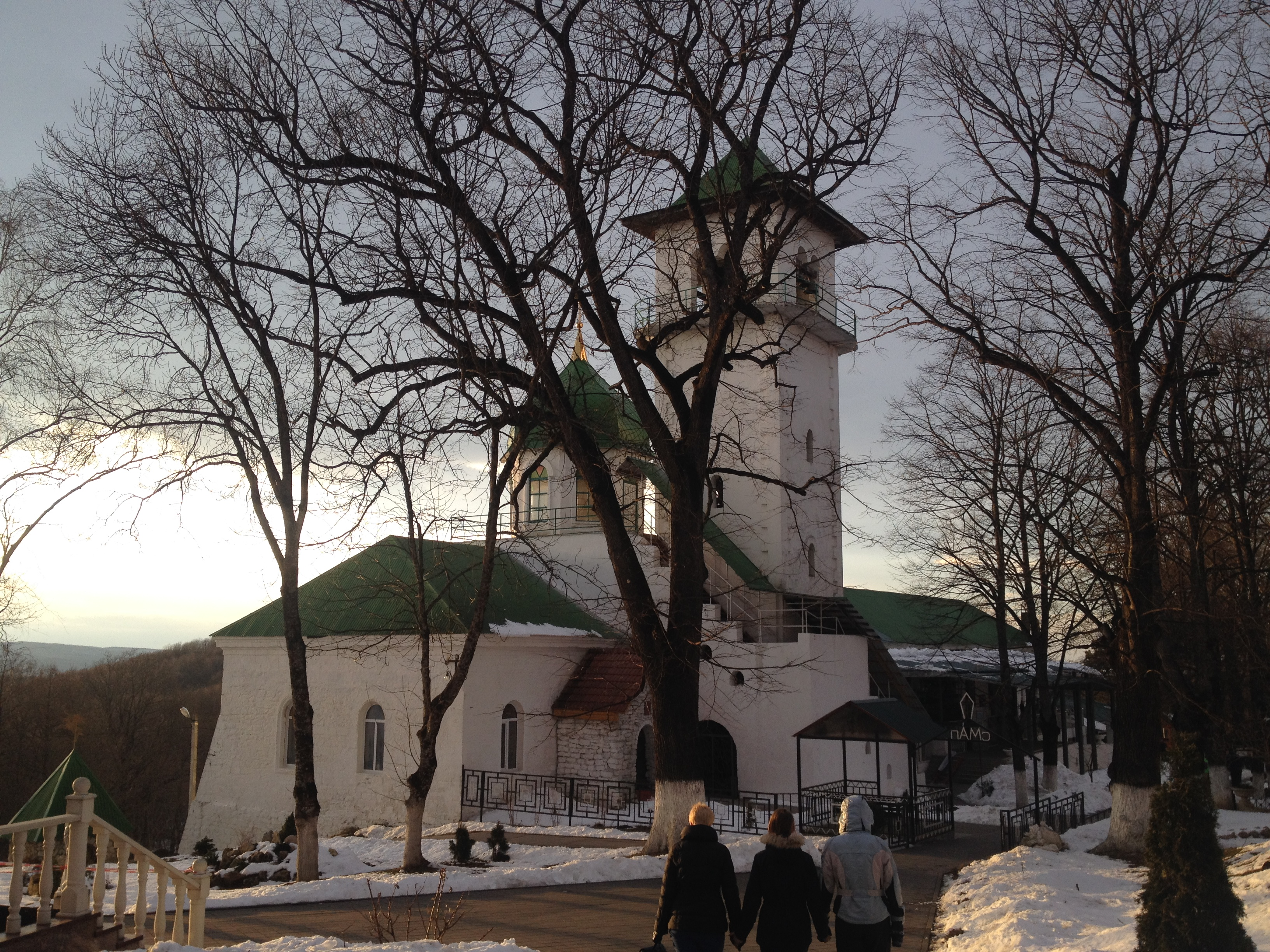 Свято-Михайловский монастырь, внутренняя территория